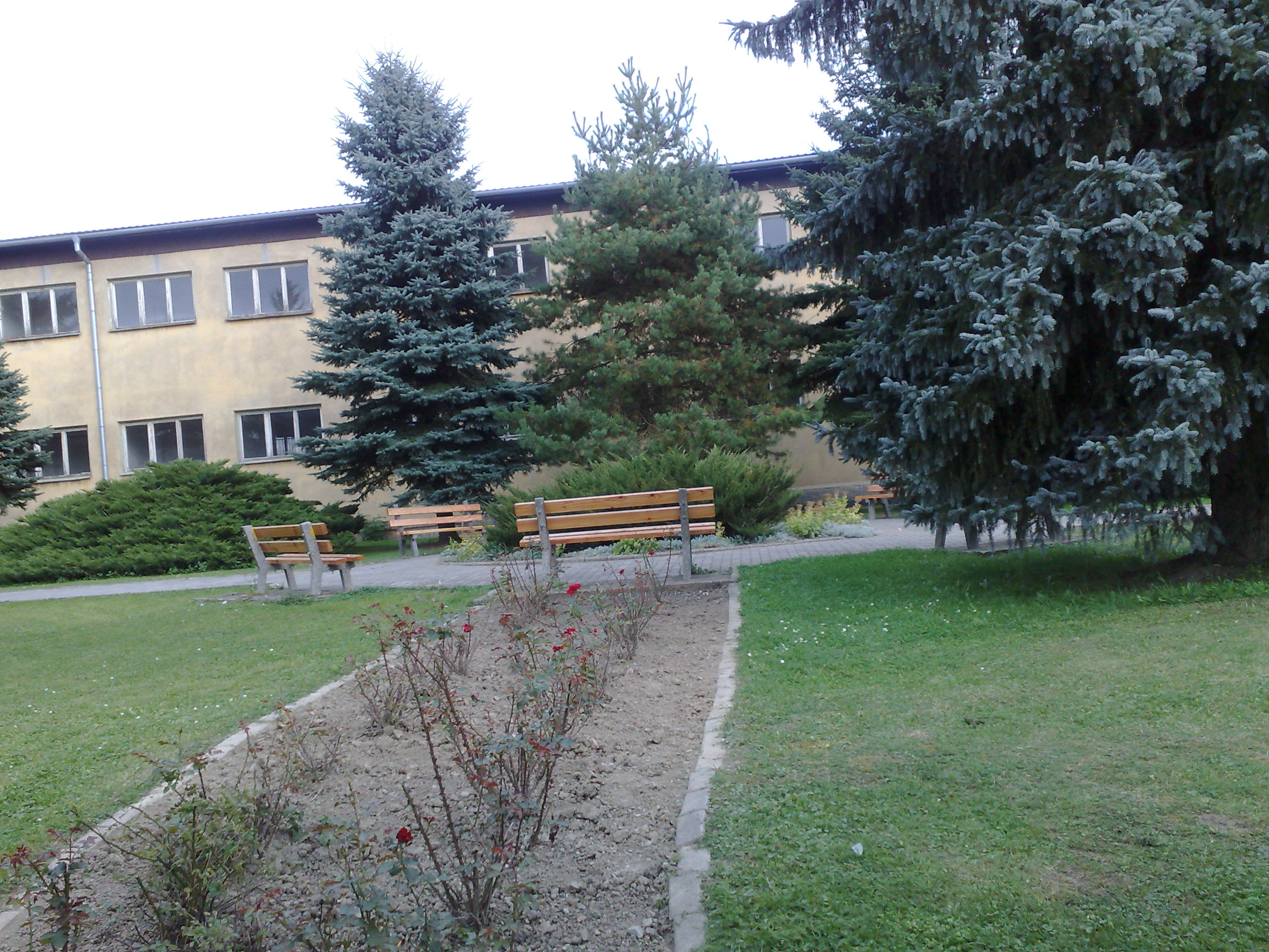 [Areal školy]